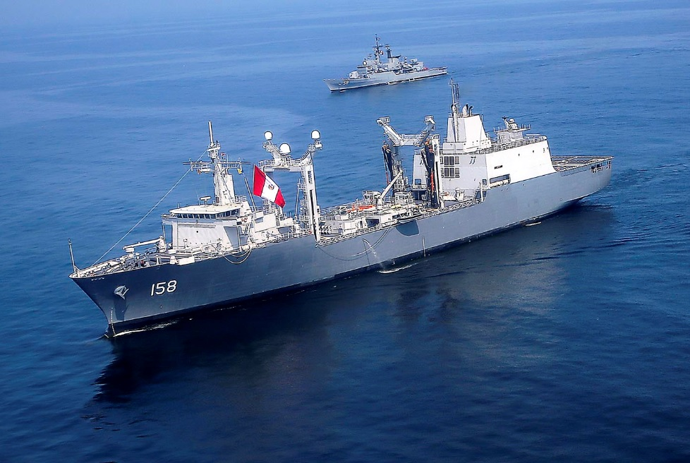 El Buque de Apoyo Logístico BAP “Tacna” se incorporó oficialmente a la Marina de Guerra del Perú y se convertirá en la mayor unidad naval de soporte logístico para ayuda humanitaria y atención a poblaciones afectadas por desastres naturales. El ministro de Defensa, Pedro Cateriano, acompañó al presidente Ollanta Humala en la ceremonia de entrega en la Base Naval del Callao. La nave fue adquirida mediante mecanismo de gobierno a gobierno con Holanda.